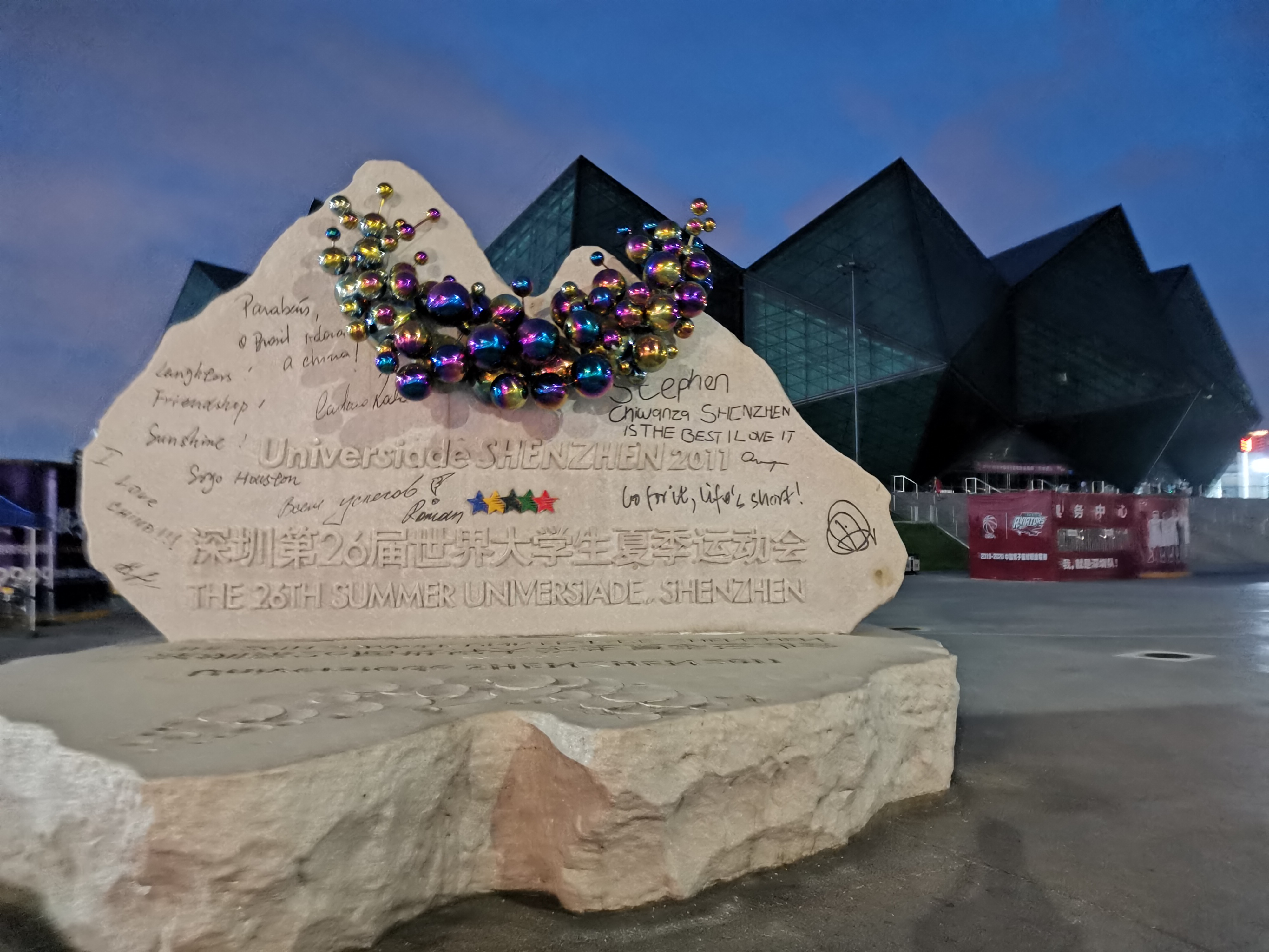 深圳龙岗大运中心，第26届世界大运会纪念雕塑